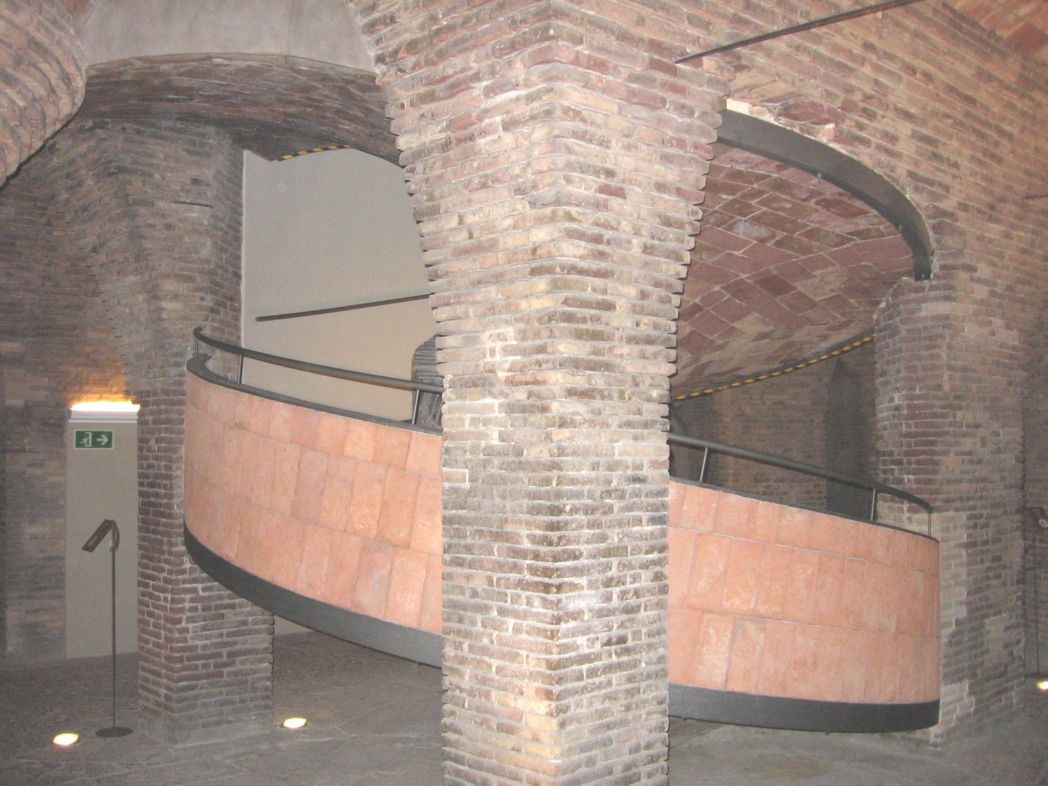 Palau Güell, de Antoni Gaudí